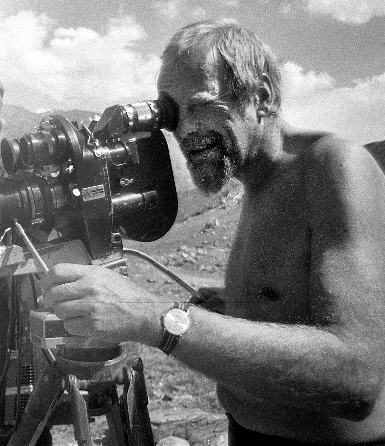 Peet Peters